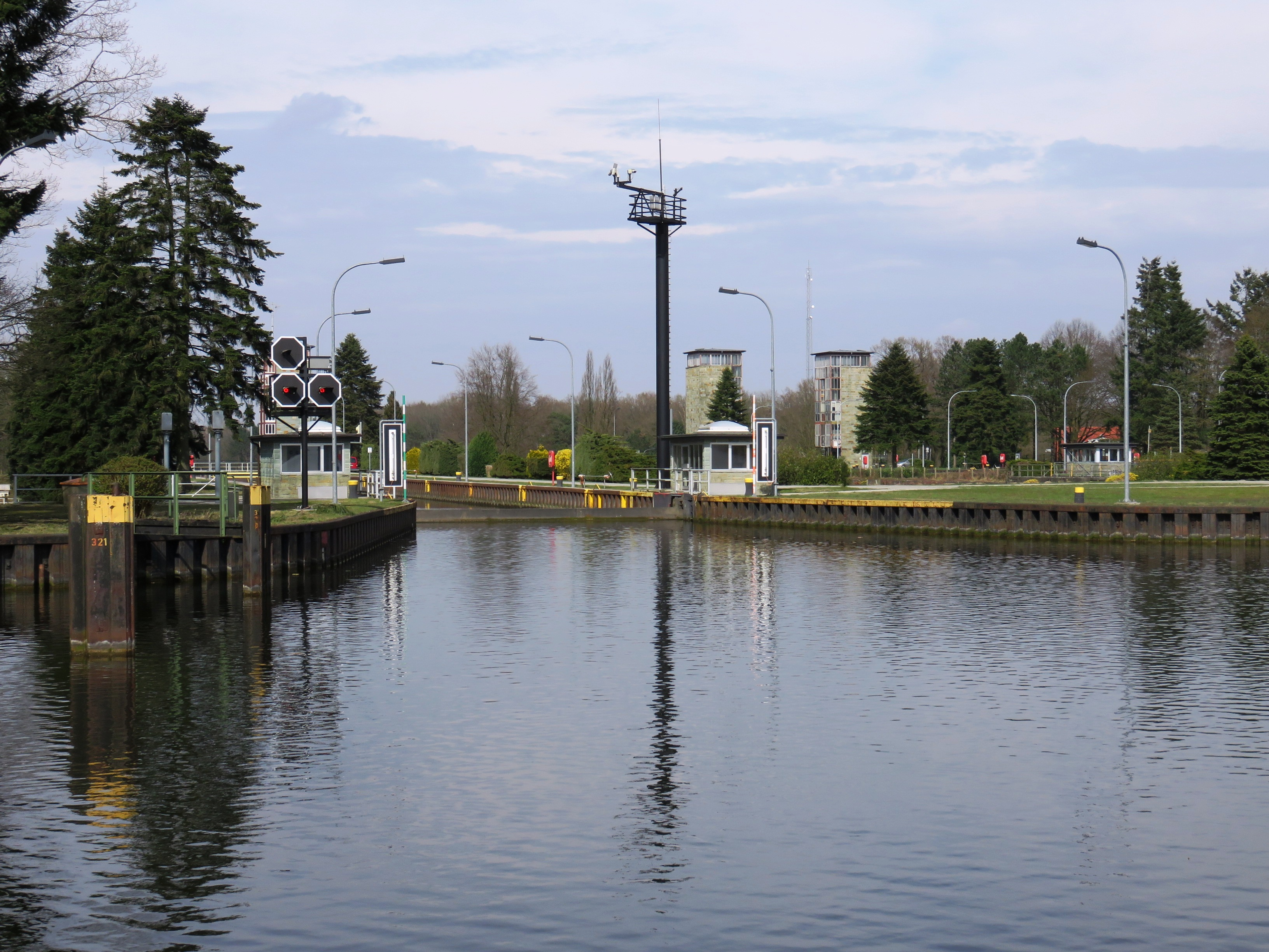 Die südliche Einfahrt in die Große Schleuse Meppen